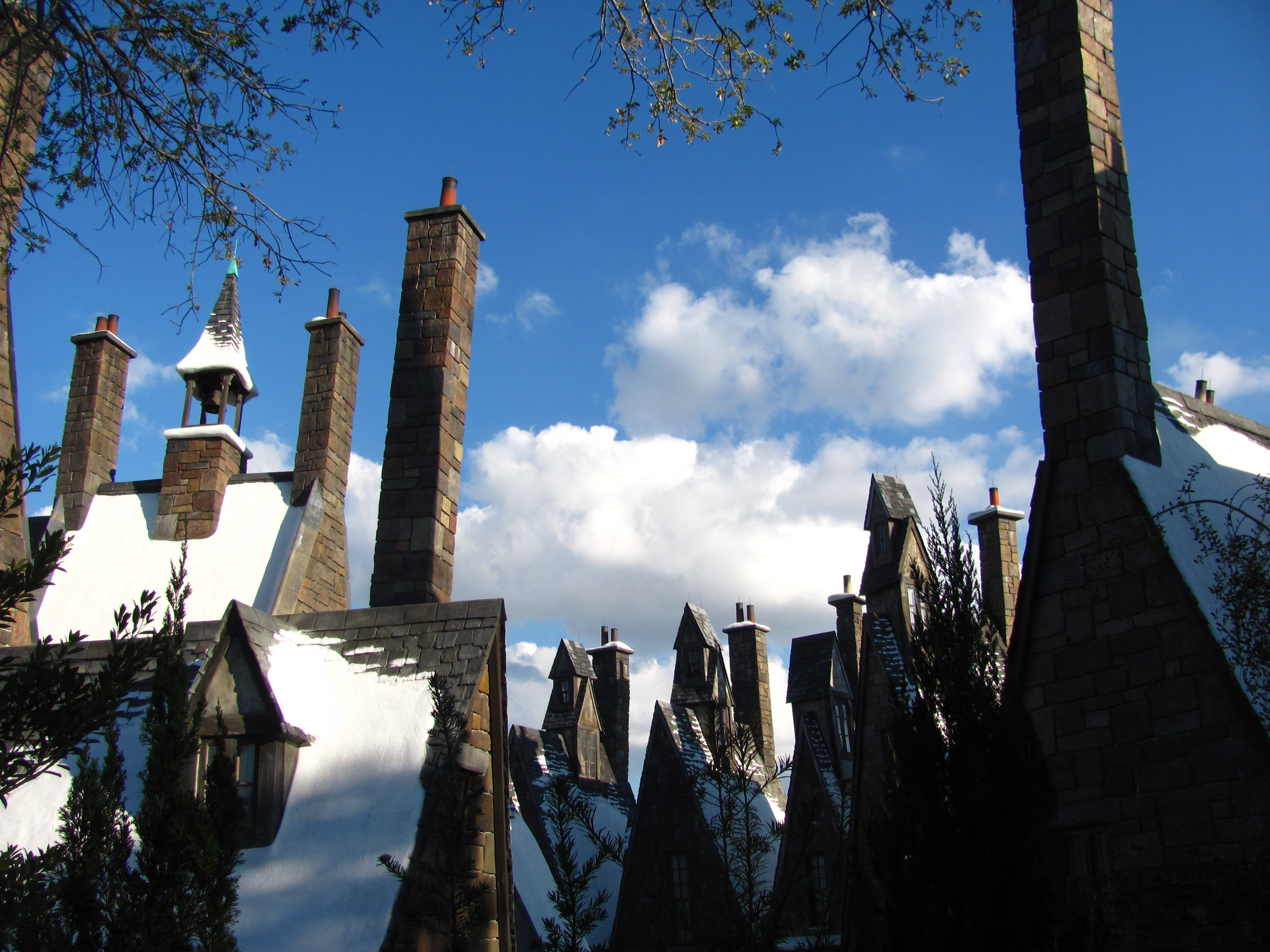 Hogsmead